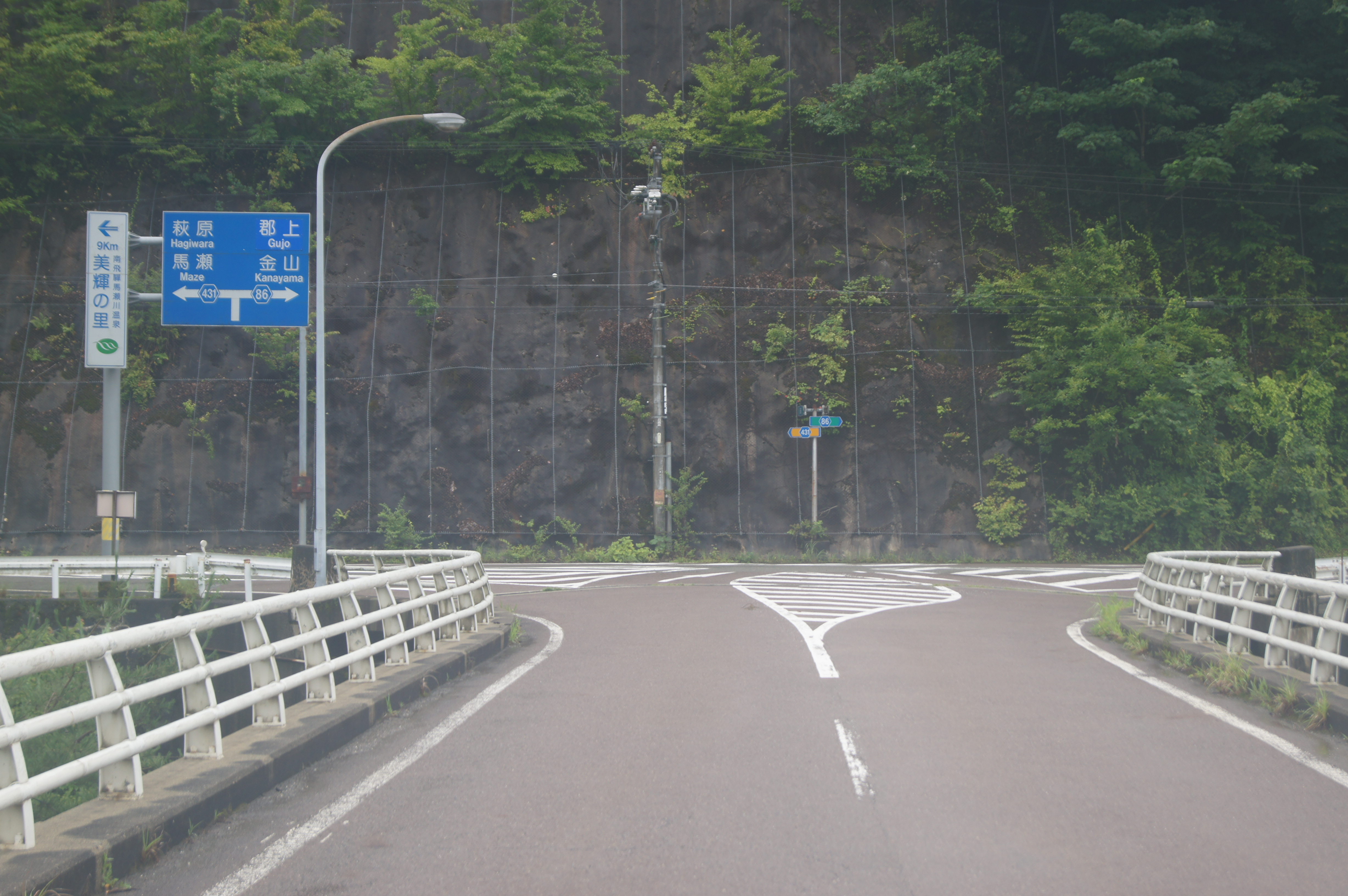 岐阜県道431号下山名丸線起点